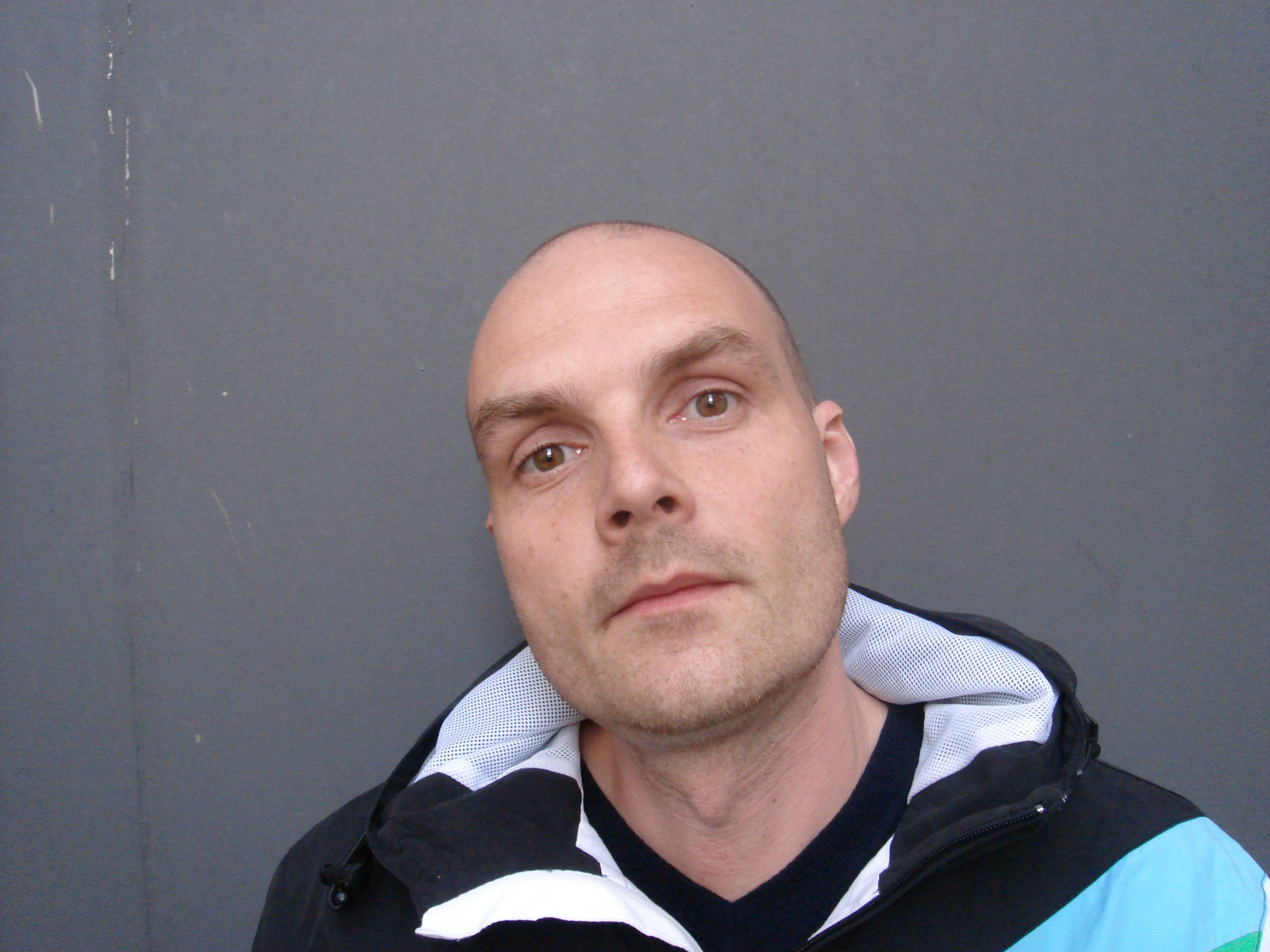 DJ Martin Eyerer